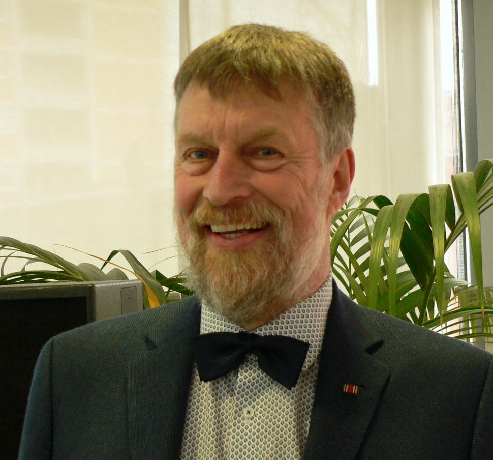 Peter Kracht beim Vortag Römer in Niedersachsen: Varus und Kalkriese in Hemmingen